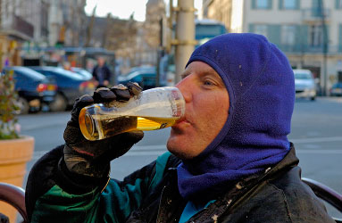 Un peu de figuration dans les Visiteurs 2